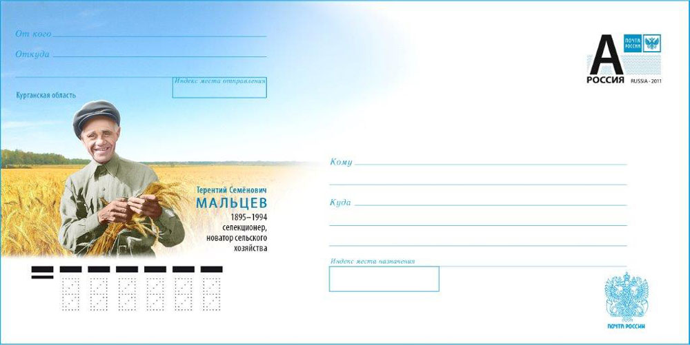 Мальцев Терентий Семёнович, почтовый конверт